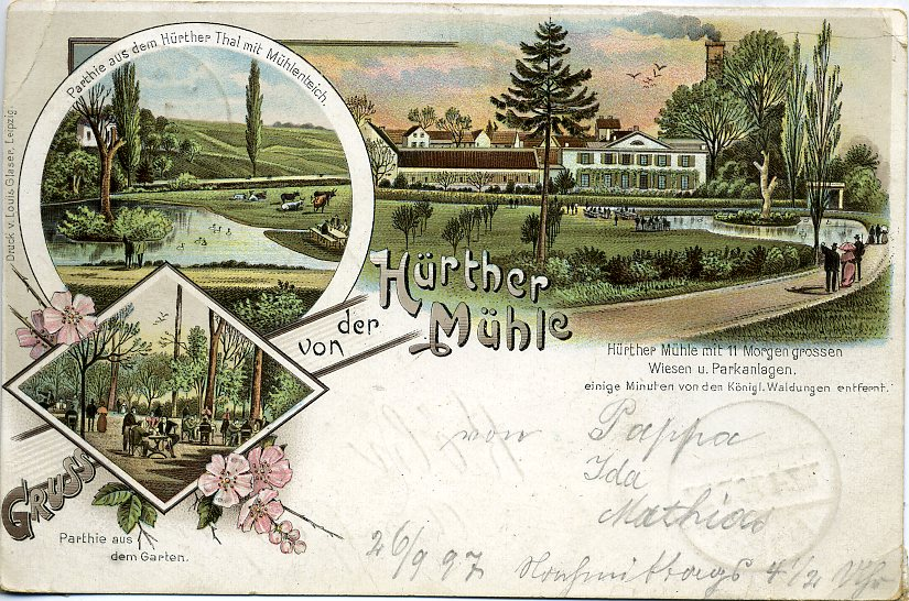 Hürther Mühle Mühlenteich -Hürther Mühle mit 11 Morgengrossen Wiesen u. Parkanlagen einige Minuten von den Königl. Waldungen entfernt.